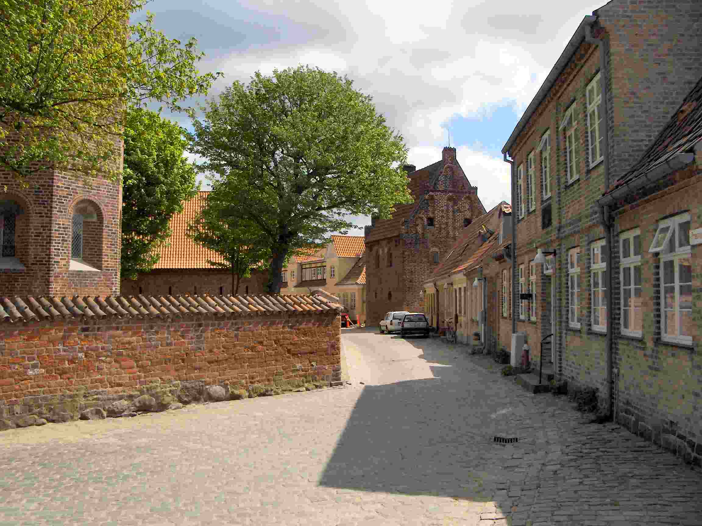 Præstegade - Parti fra højbyen i Kalundborg optaget af --Lcl 12:09, 3 June 2006 (UTC)